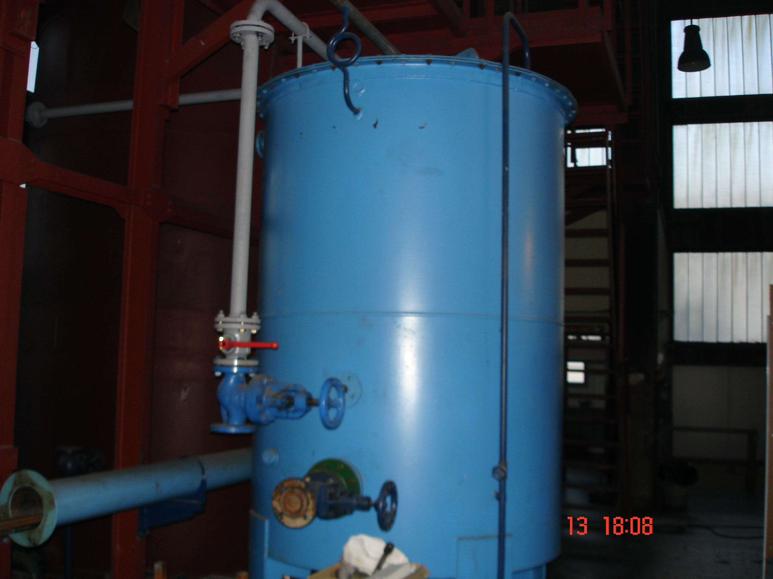 kotao